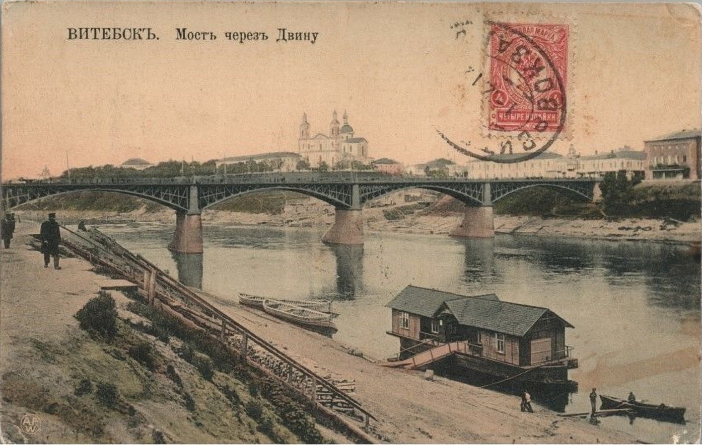 Беларуская (тарашкевіца): Віцебск (Viciebsk), Дзьвінскі мост (Dźvinski most). Царква Прачыстай Багародзіцы і манастыр базылянаў